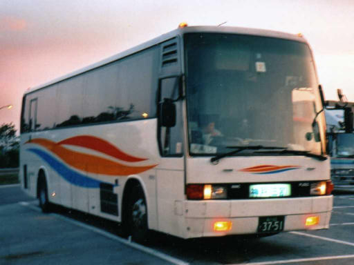 Keikyu Bus "Anchor" Mitsubishi P-MS725SA改 at Kora Perking Area